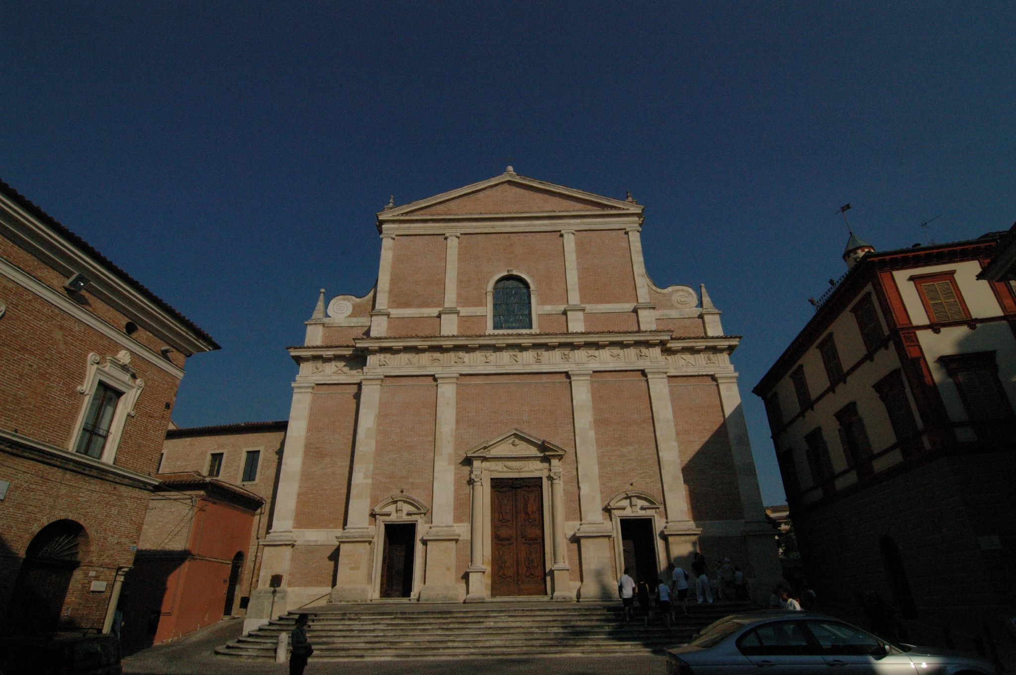 Facciata del Duomo di Fabriano.